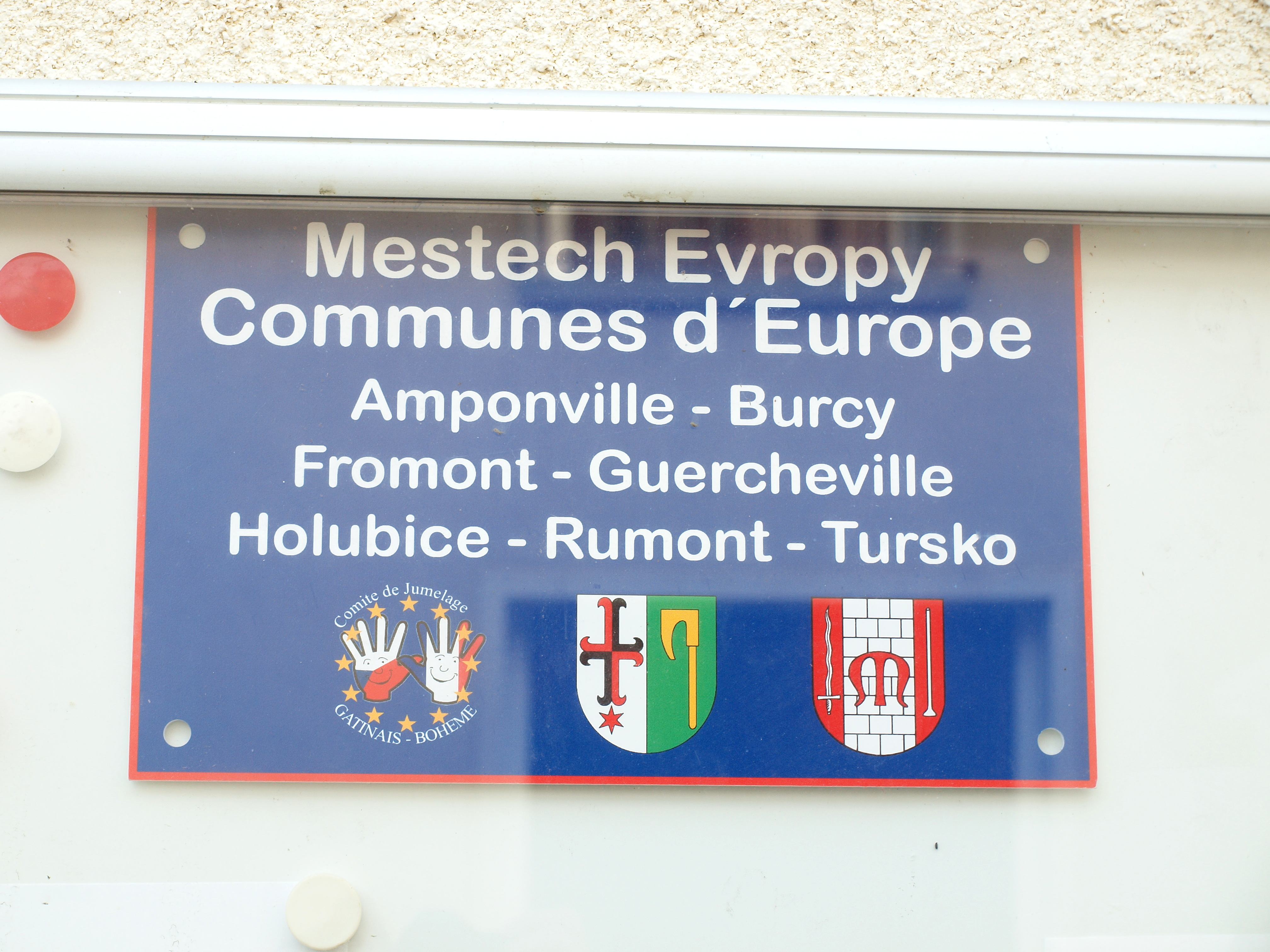 Mairie de Rumont (Seine-et-Marne, France)